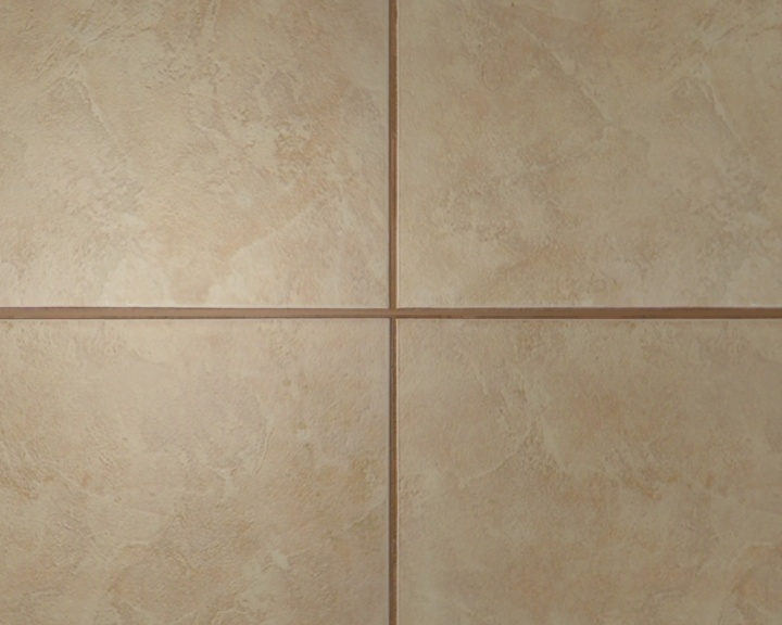 Dlažba s použitím bump mapy.